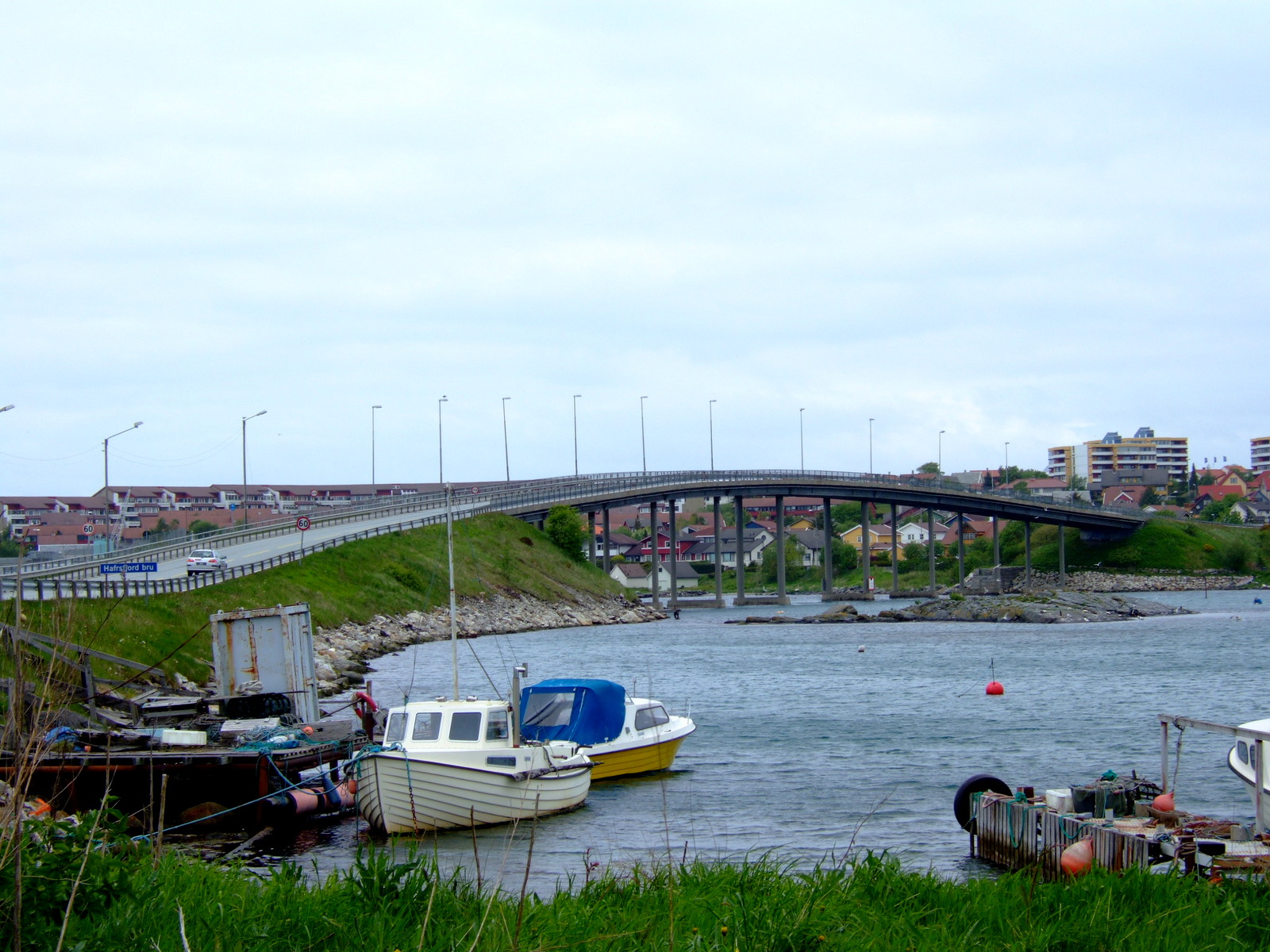 Hafrsfjord bro, Rogaland